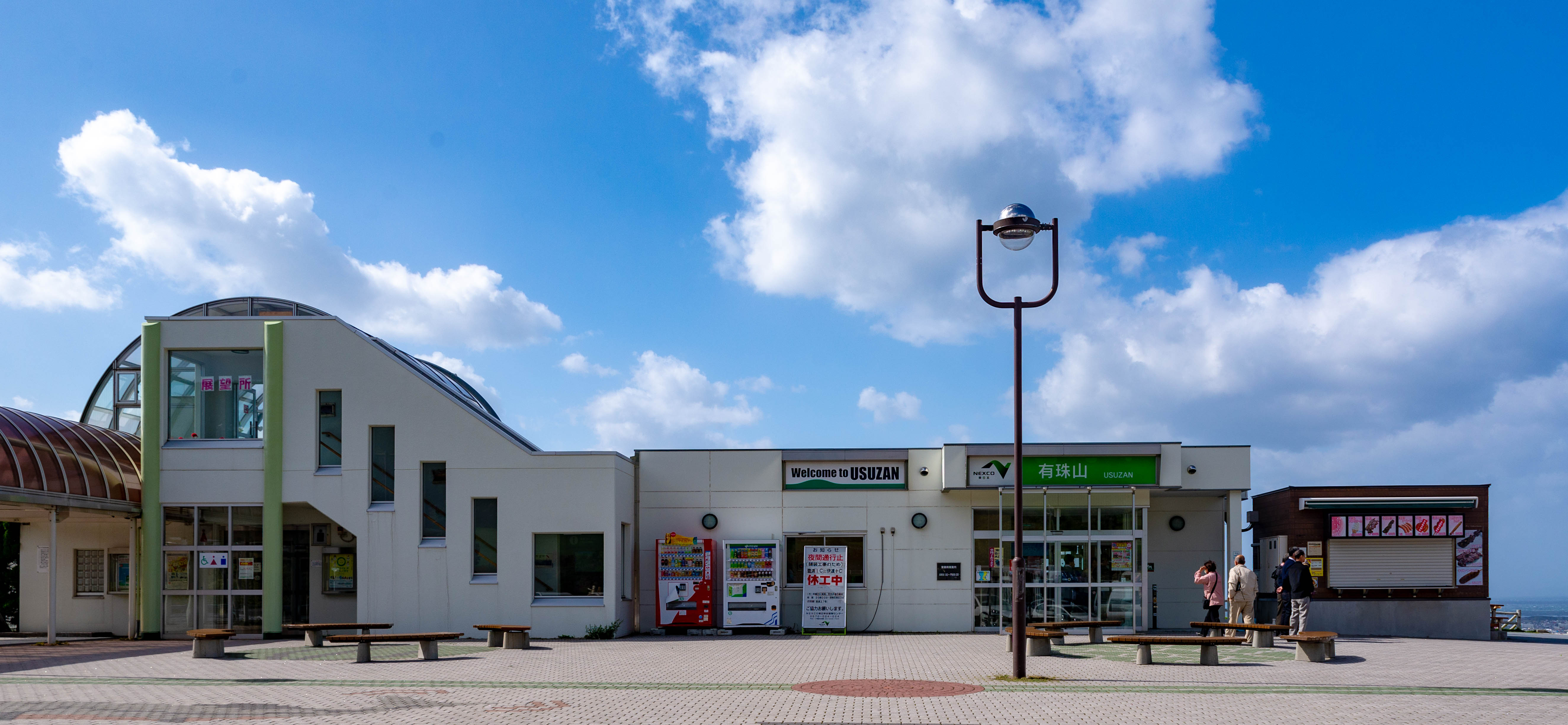 東日本高速道路株式会社道央道有珠山サービスエリア